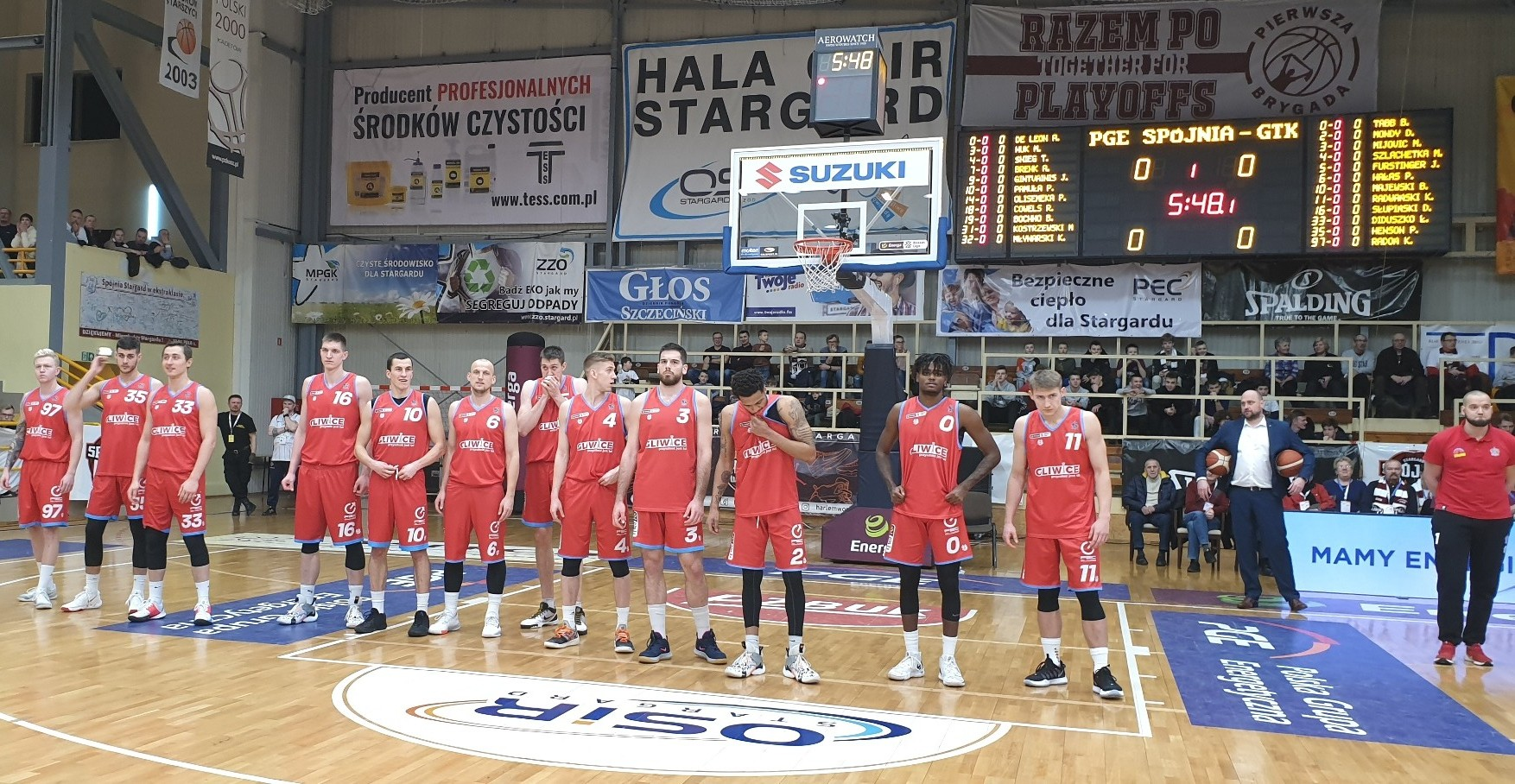 Prezentacja GTK Gliwice